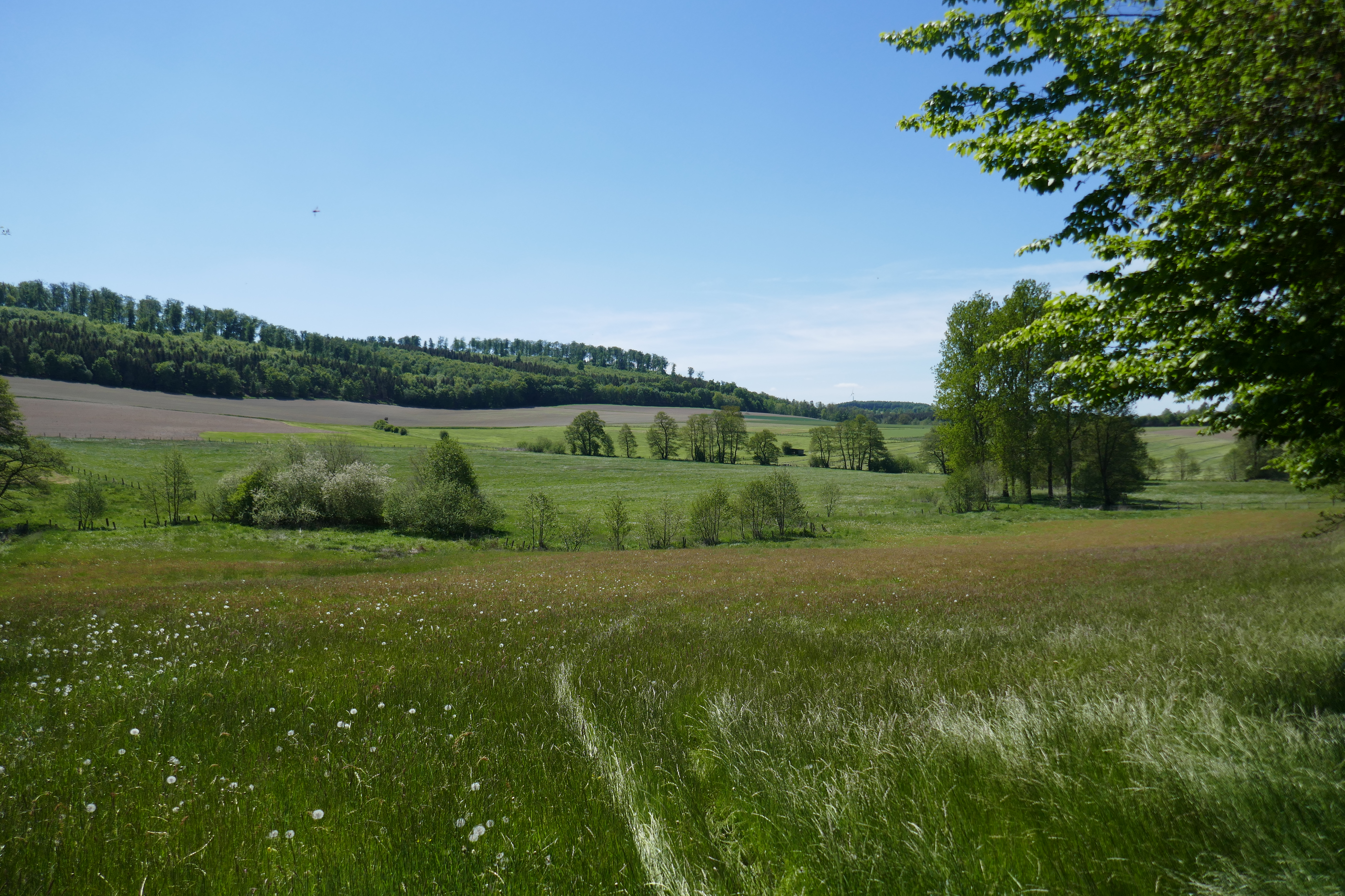 Lühlingsbachtal, Naturschutzgebiete „Lühlingsbachtal“ (Landschaftsplan Hoppecketal, Hochsauerlandkreis) und „Lühlingsbach-Nettetal“ ( Landschaftsplan Büren-Wünnenberg, Kreis Paderborn)